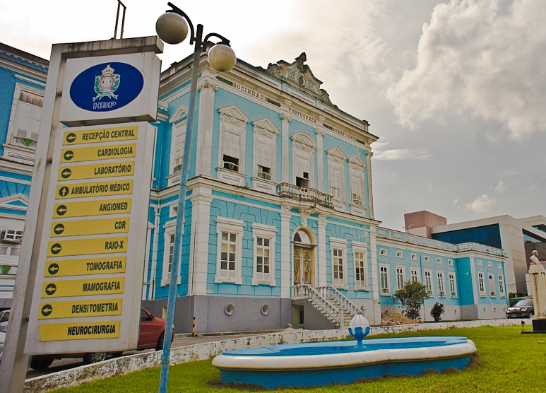 Hospital Beneficente Portugues, Manaus, Brasil